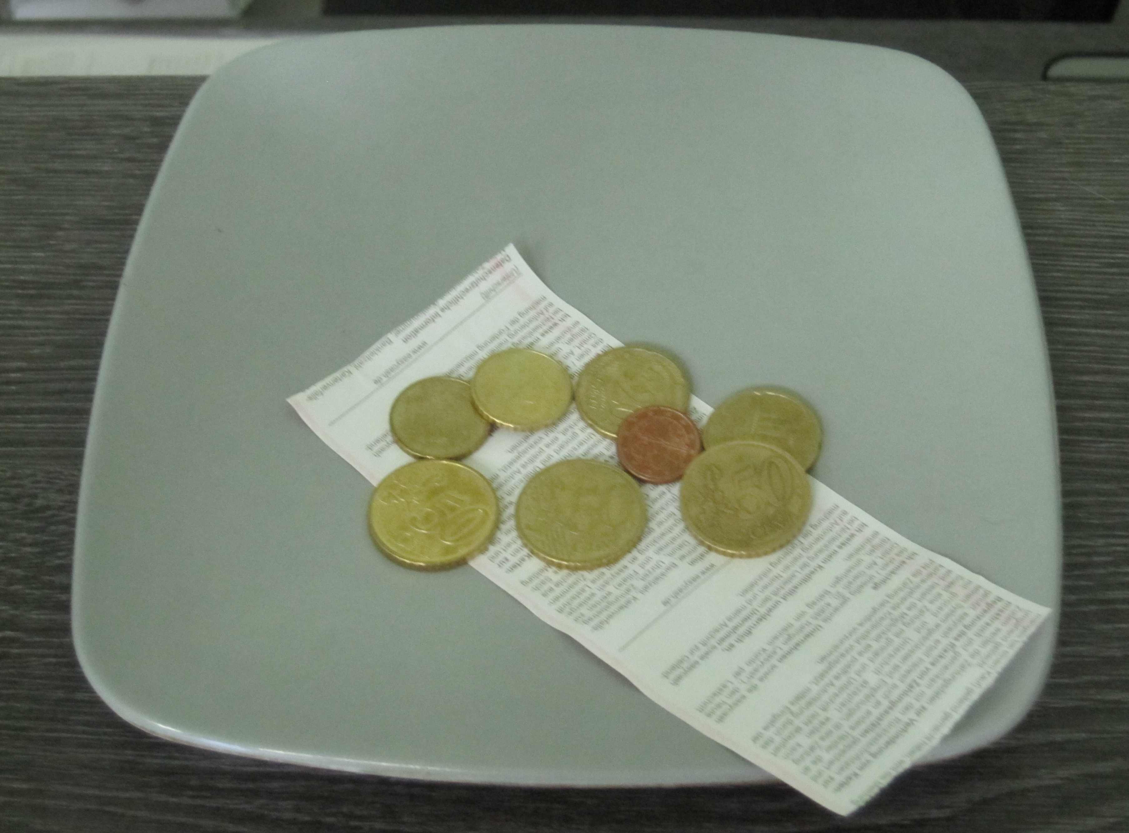 Zahlteller